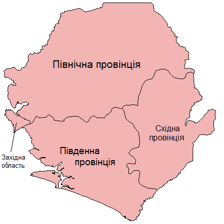 Провінції та область Сьєрра-Леоне (адміністративно-територіальний поділ 1 рівня)